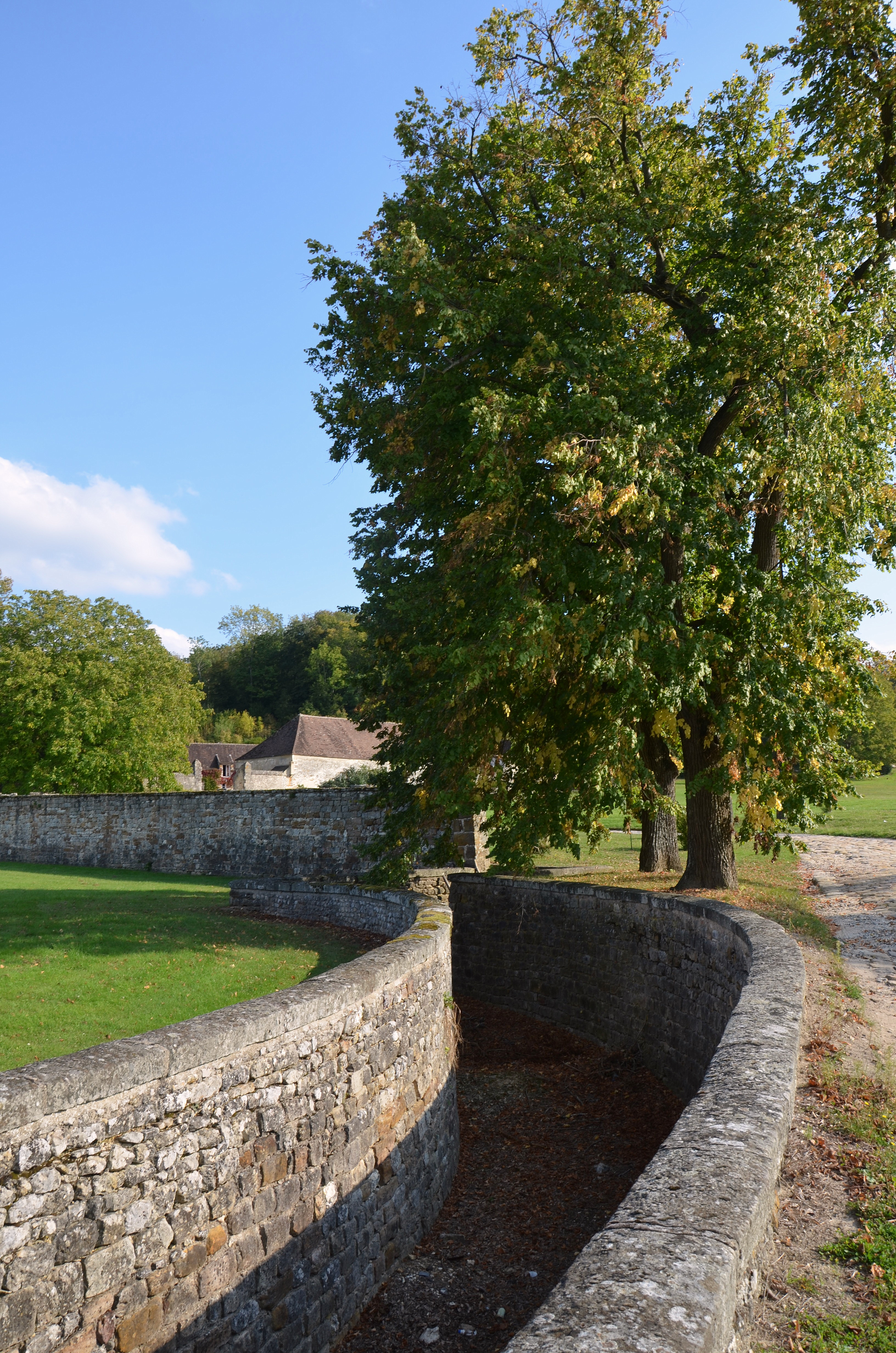 Canal d'alimentation du parc de l'ancien chateau de Saint-Ange à Villecerf (Seine et Marne, France)